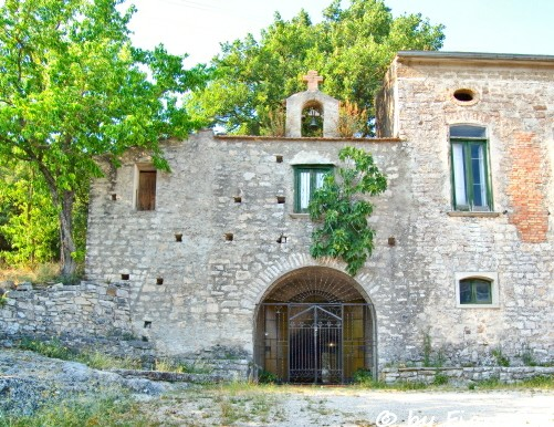 Ingresso alla chiesa-grotta di San Michele, nei pressi di Casalbore (AV)